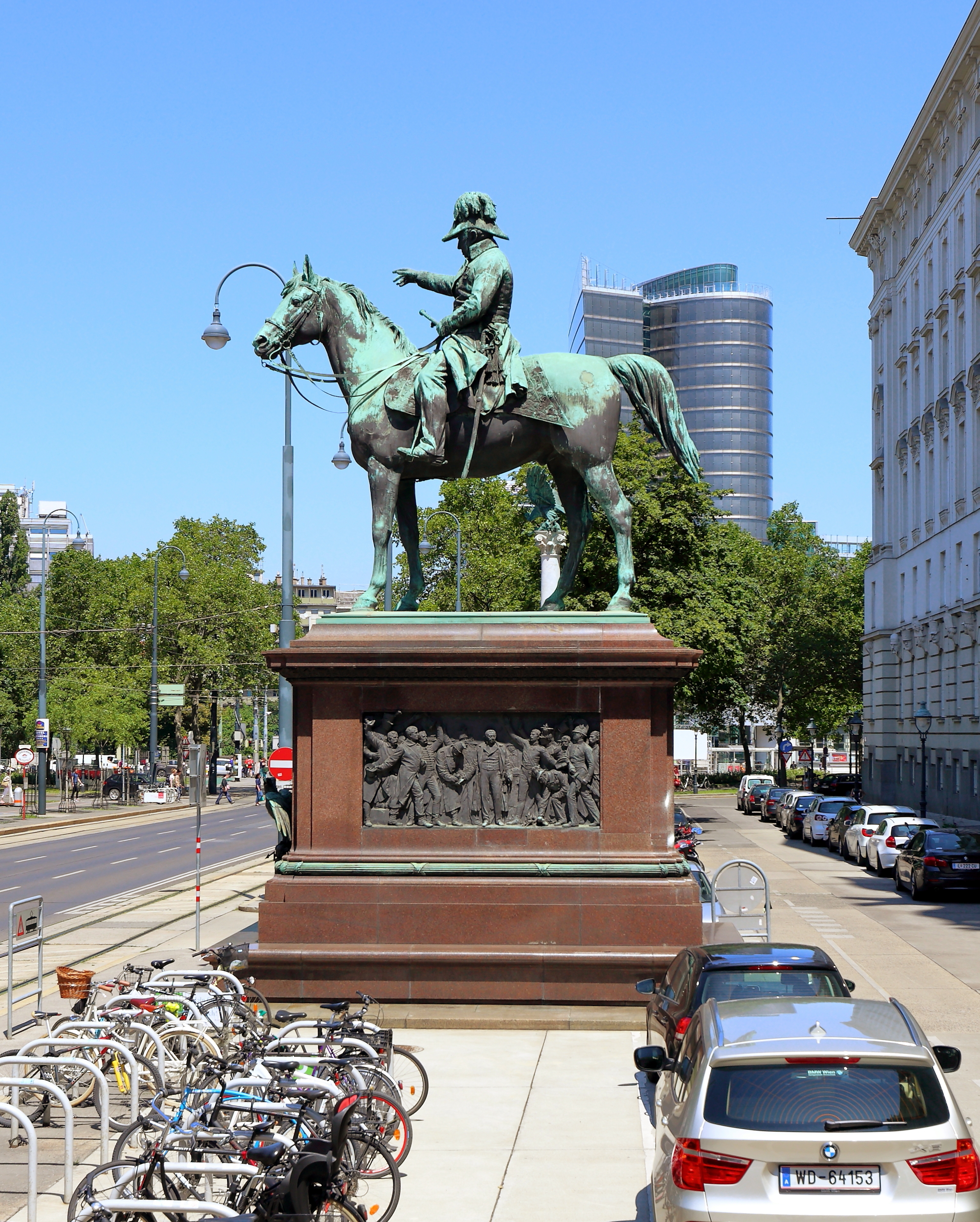 Das Radetzky-Reiterstandbild vor dem Regierungsgebäude (ehem. K.u.k. Kriegsministerium) am Stubenring 1 in der österreichischen Bundeshauptstadt Wien.Das Denkmal für Feldmarschall Johann Joseph Wenzel Graf Radetzky von Radetz (1766–1858) gab 1886 Erzherzog Albrecht in Auftrag und wurde von Caspar von Zumbusch in den Jahren von 1886 bis 1892 errichtet. Der Sockel wurde nach den Plänen des Architekten George Niemann ausgeführt. Die Reliefs links und rechts am Sockel sind Werke von Hans Bitterlich und zeigen Radetzky beim Kriegsrat im Kreise seiner Generäle sowie Vater Radetzky mit Soldaten. An der Vorderseite des Sockel befindet sich ein bronzener Doppeladler und darüber eine Tafel mit den berühmten Worten von Franz Grillparzer: "In deinem Lager ist Österreich". Ursprünglich war der Standort des Reiterstandbildes vor dem ehemaligen Hofkriegsratsgebäude Am Hof (Enthüllung am 24.4.1892), 1912 wurde es vor das neu errichtete Kriegsministerium am Stubenring versetzt.